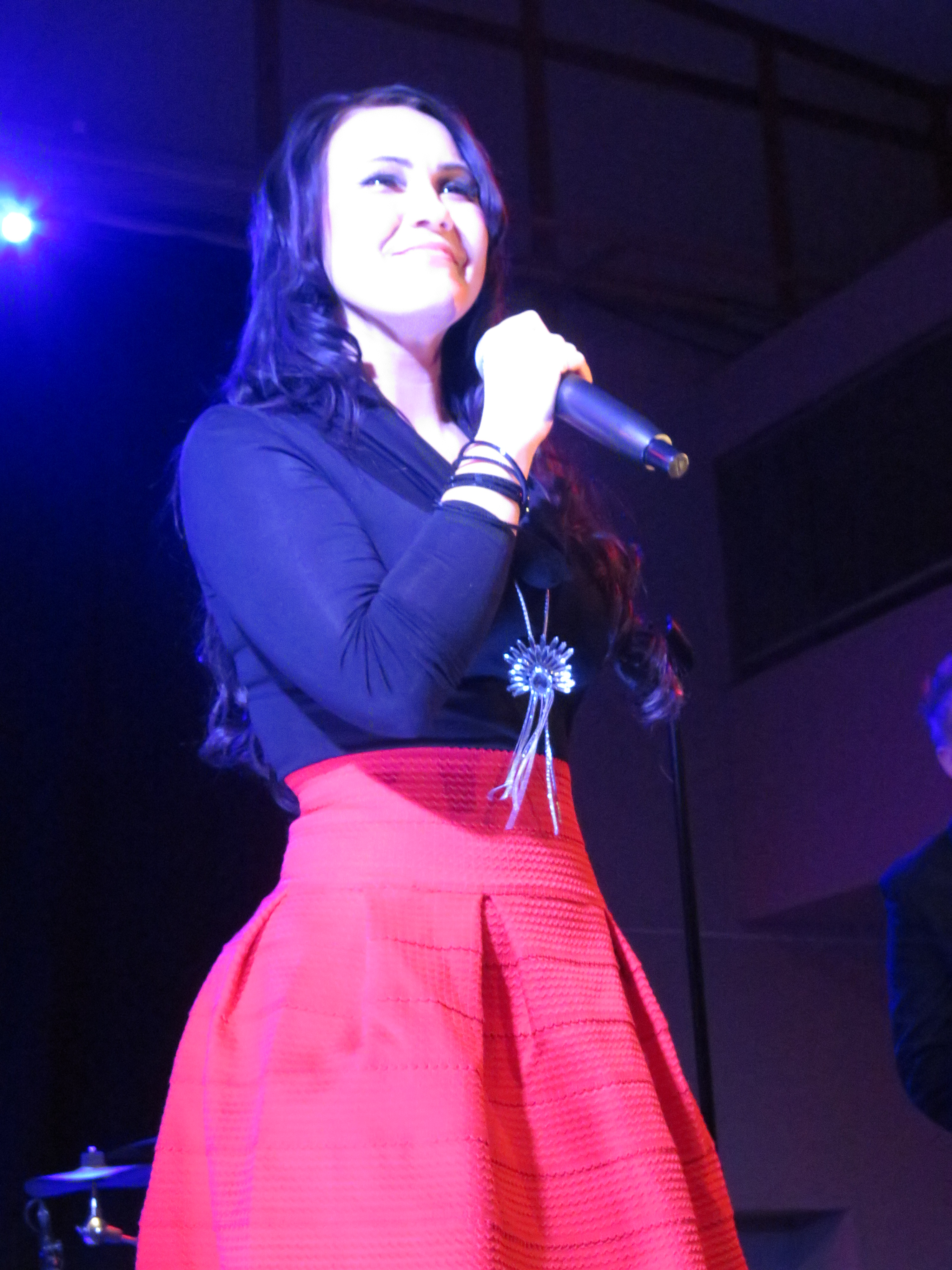 Saija Tuupanen suomalainen iskelmälaulaja